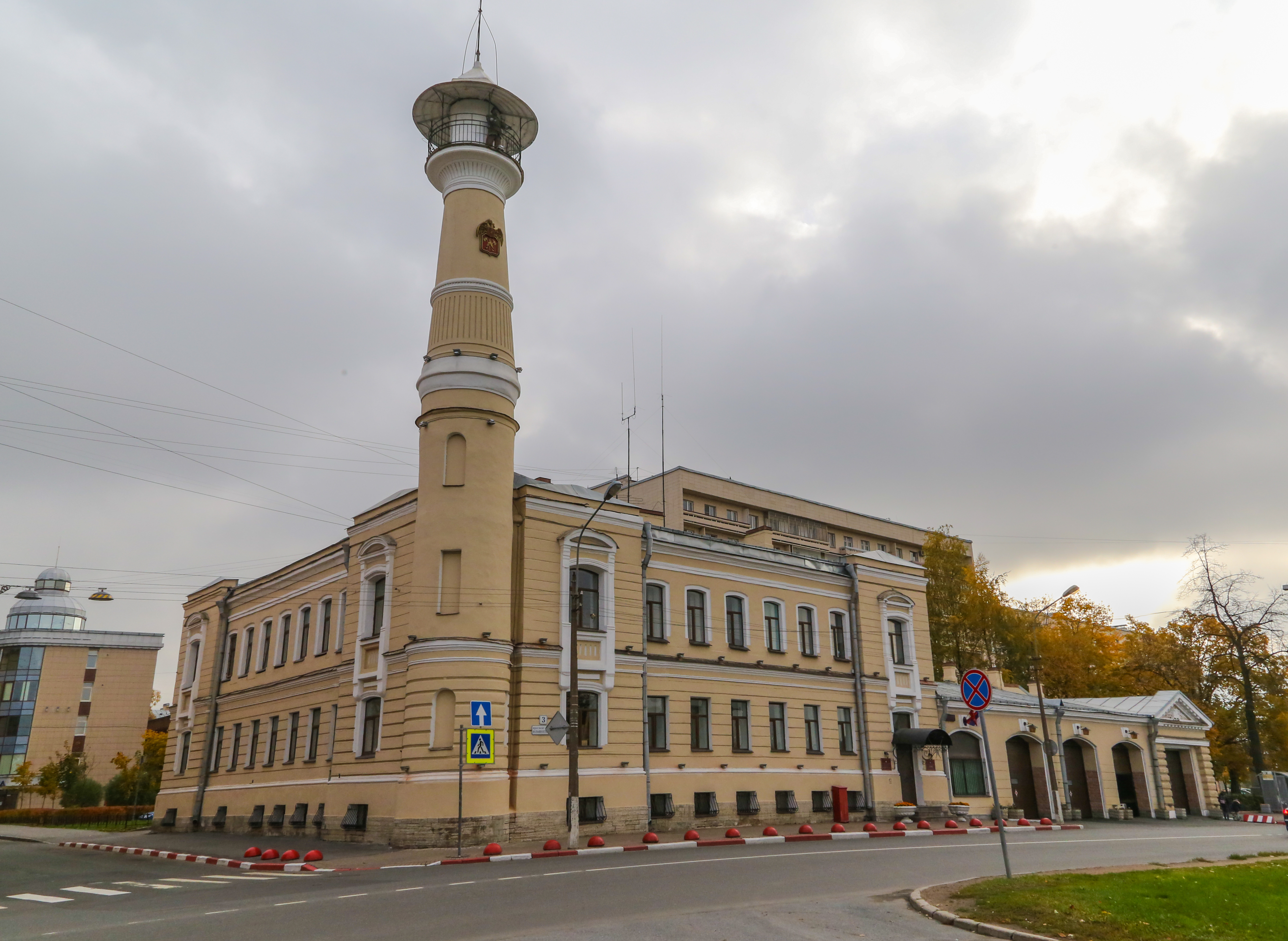 Пожарная каланча (Санкт-Петербург и Лен.область, Санкт-Петербург, большеохтинский пр., 3, конторская улица, 1)